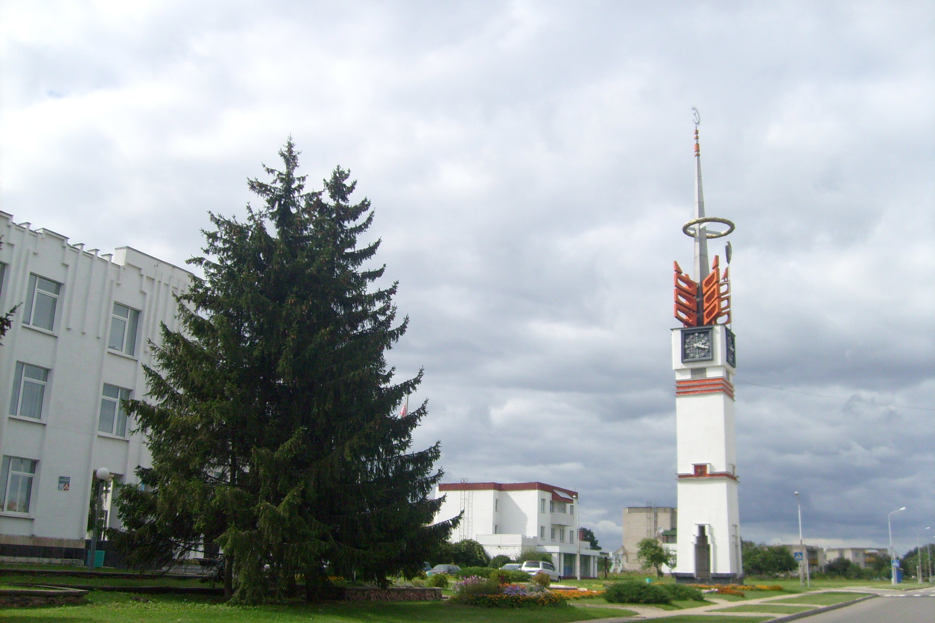 Деревня Мышковичи (Кировский район, Могилёвская область)